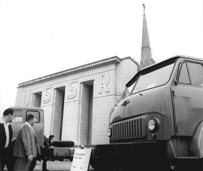 Leipzig, Herbstmesse, Freigelände, Nutzfahrzeuge Zentralbild Raphael 1-9-70 Leipzig: Herbstmesse 1970- Vor dem Pavillon der UdSSR stellt die Sowjetunion im Rahmen ihrer Kollektivausstellung Nutzfahrzeuge aus.